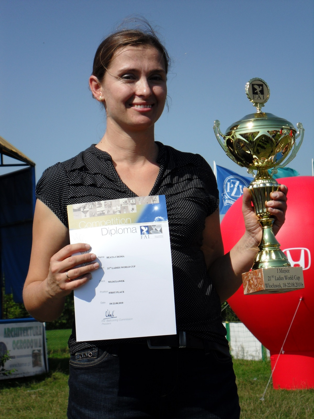 Beata Choma, zawodniczka uprawiająca sport balonowy.